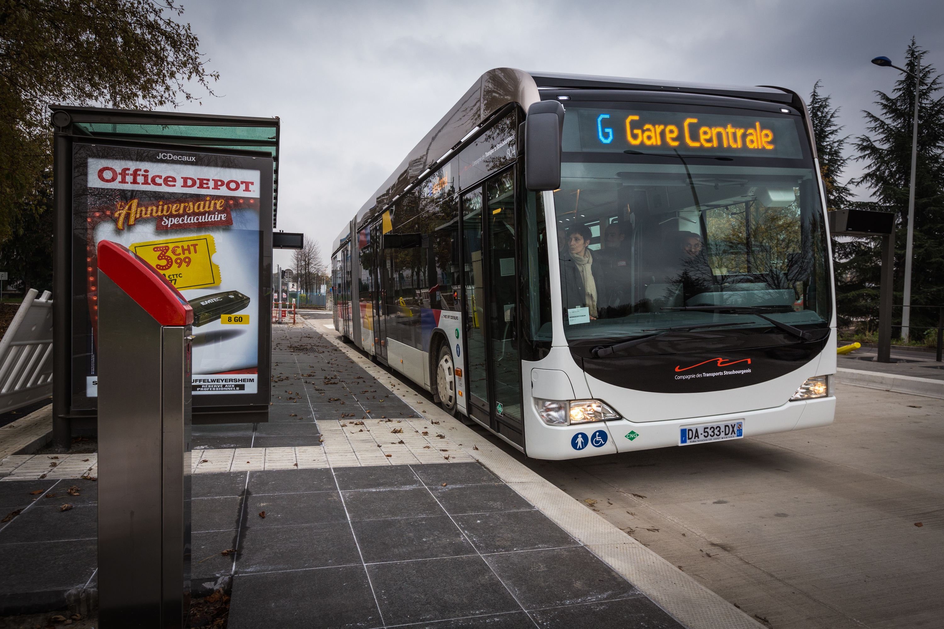 BHNS ligne G phase d'essai et de formation. Strasbourg 14 novembre 2013.